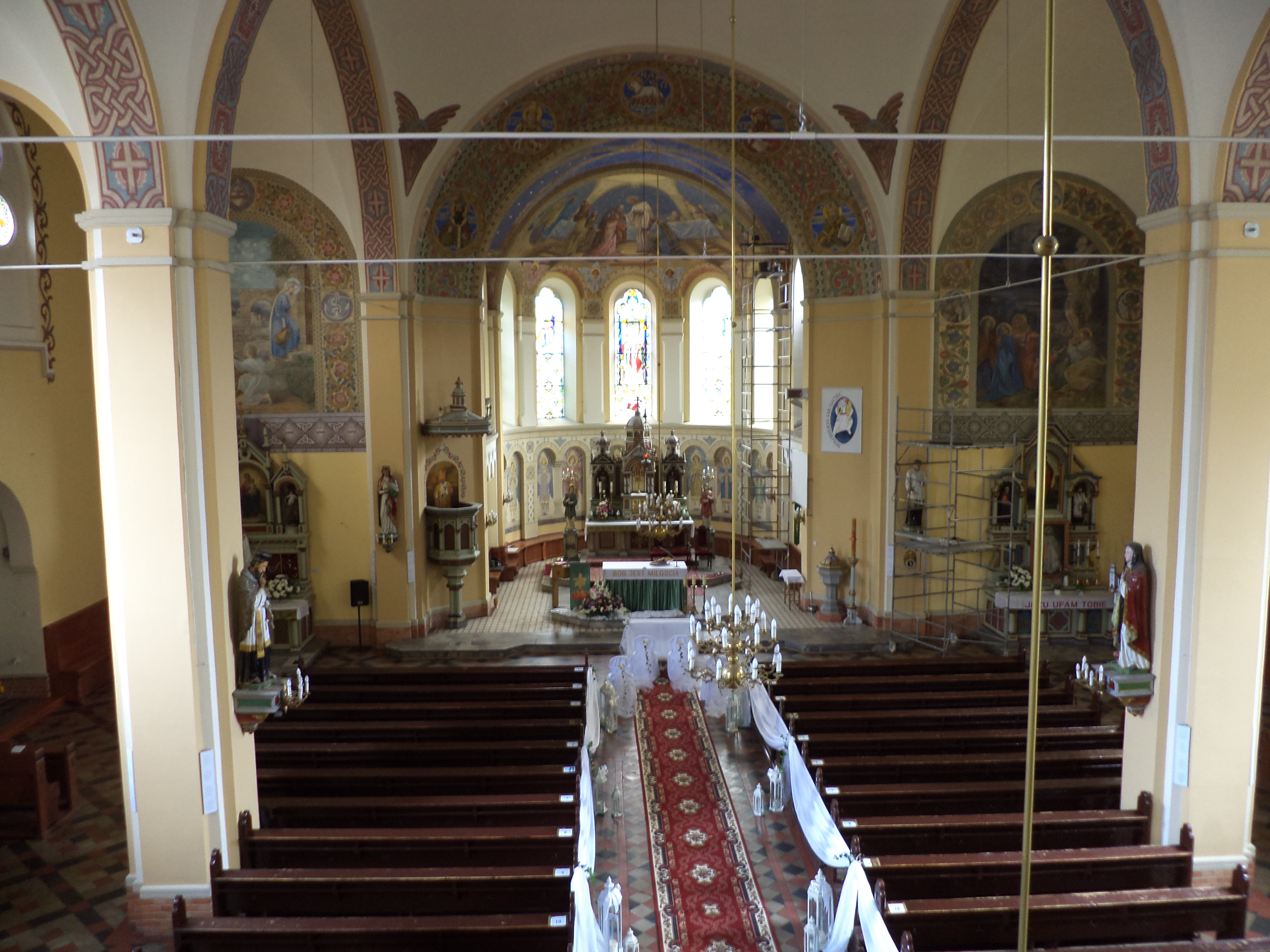 Wnętrze nowego kościoła św. Marcina w Starych Tarnowicach